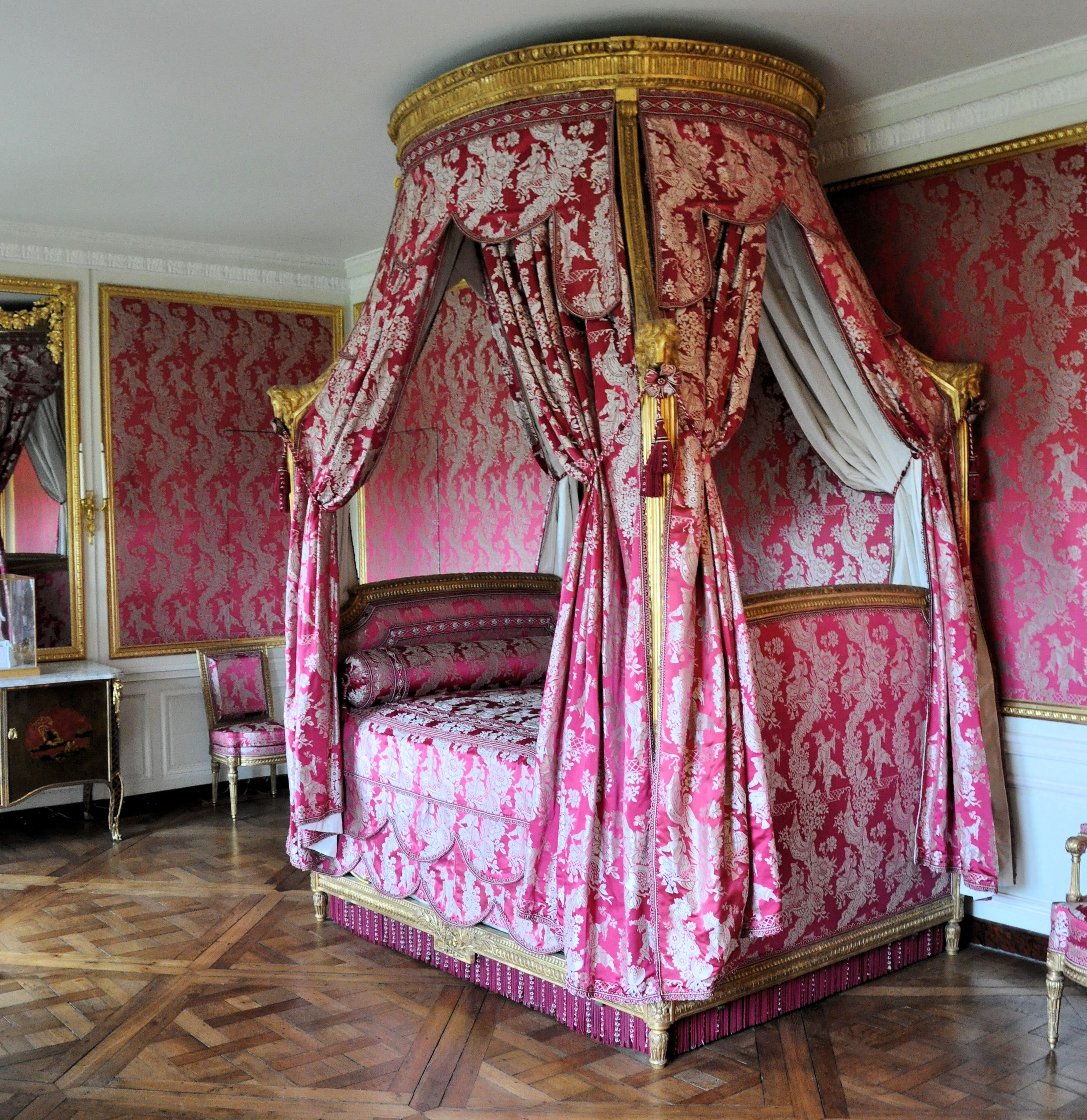 Attique du Petit Trianon - Chambre du roi - Lit